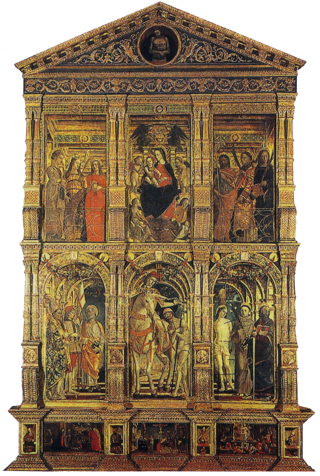 Butinone e zenale, pala di san martino, 1481-85